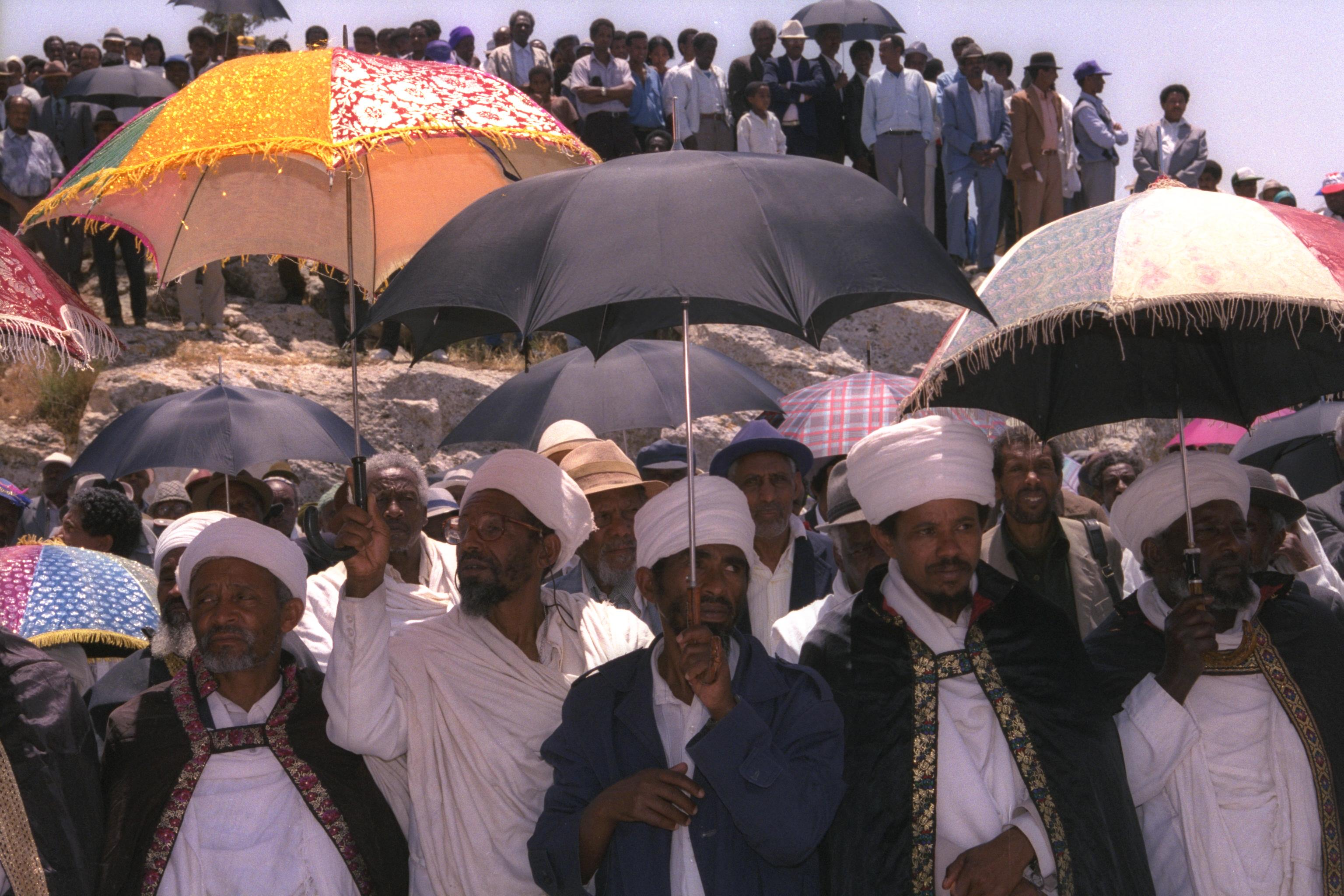 Memorial ceremony for Ethiopian immigrants at Har Tayasim. Photograph: OHAYON AVI, GPO. 19/05/1993. . טקס אזכרה של עולים מאתיופיה, לזכר חבריהם שנפלו בדרכם לישראל, בהר הטייסים.